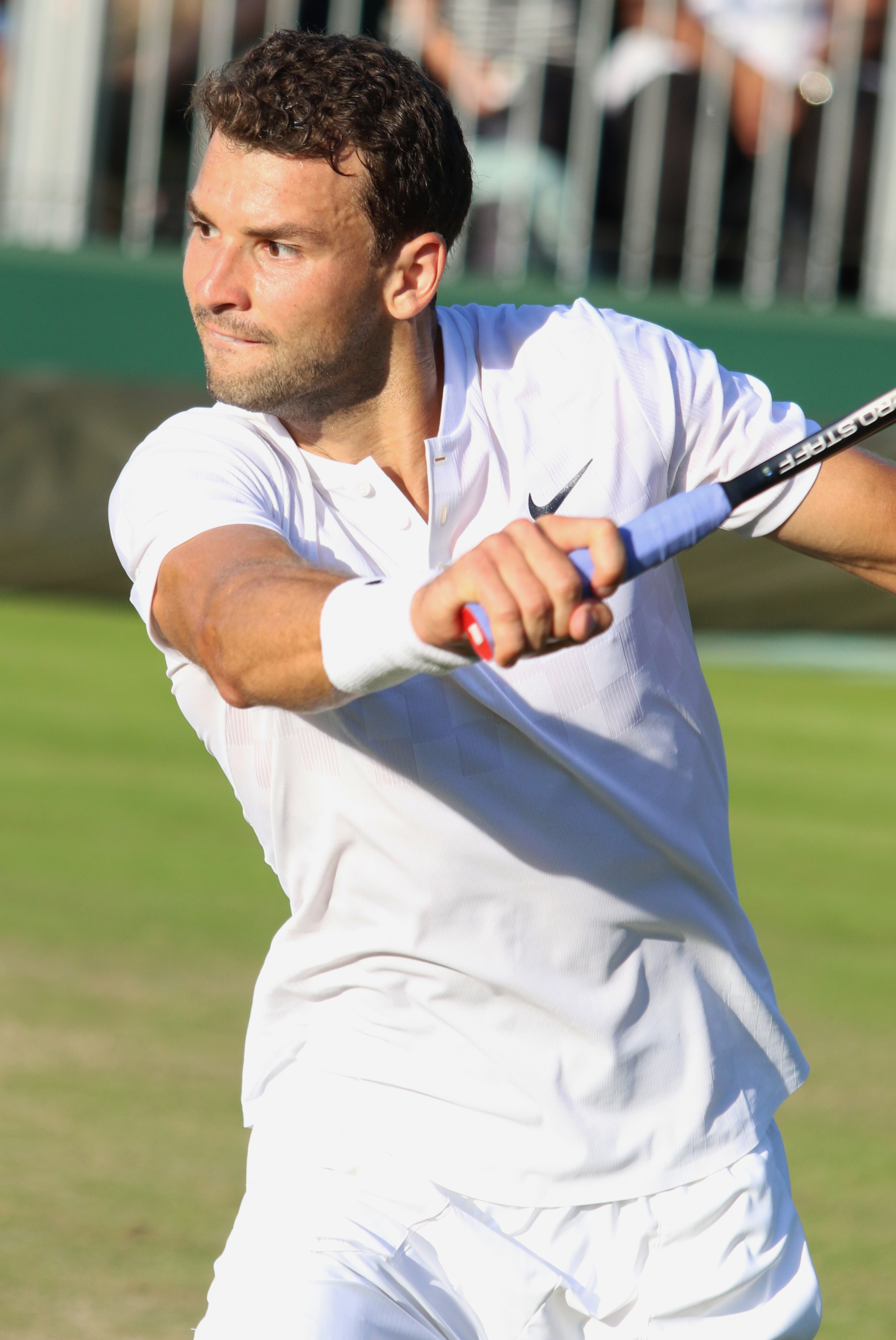 Dimitrov WM17 (14)